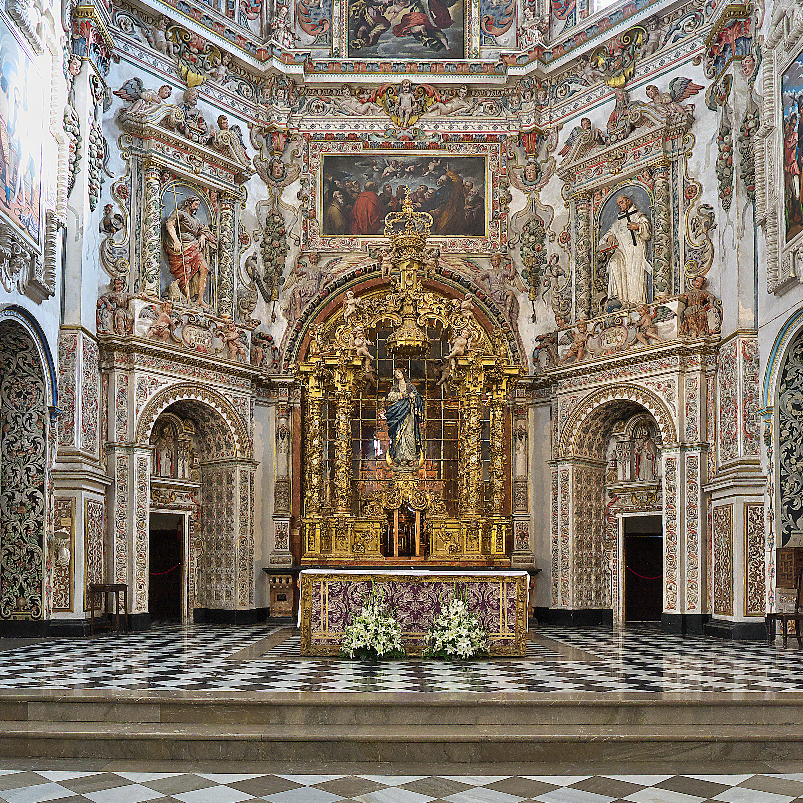 Altar mayor con baldaquino de madera de Francisco Hurtado Izquierdo (1710). La imagen de la Inmaculada Concepción es obra de José de Mora.